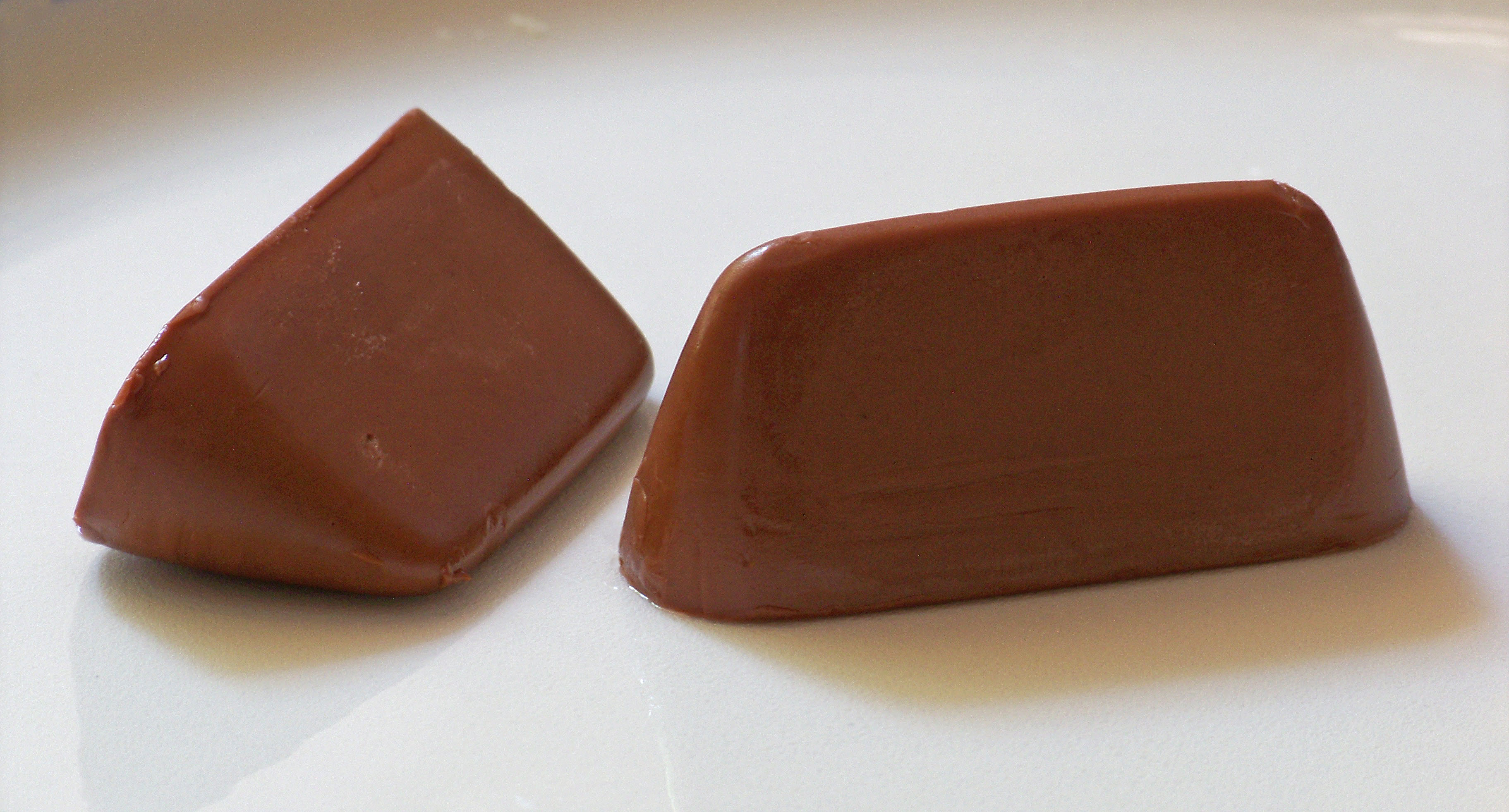 due gianduiotti torinesi gianduiotto Torino